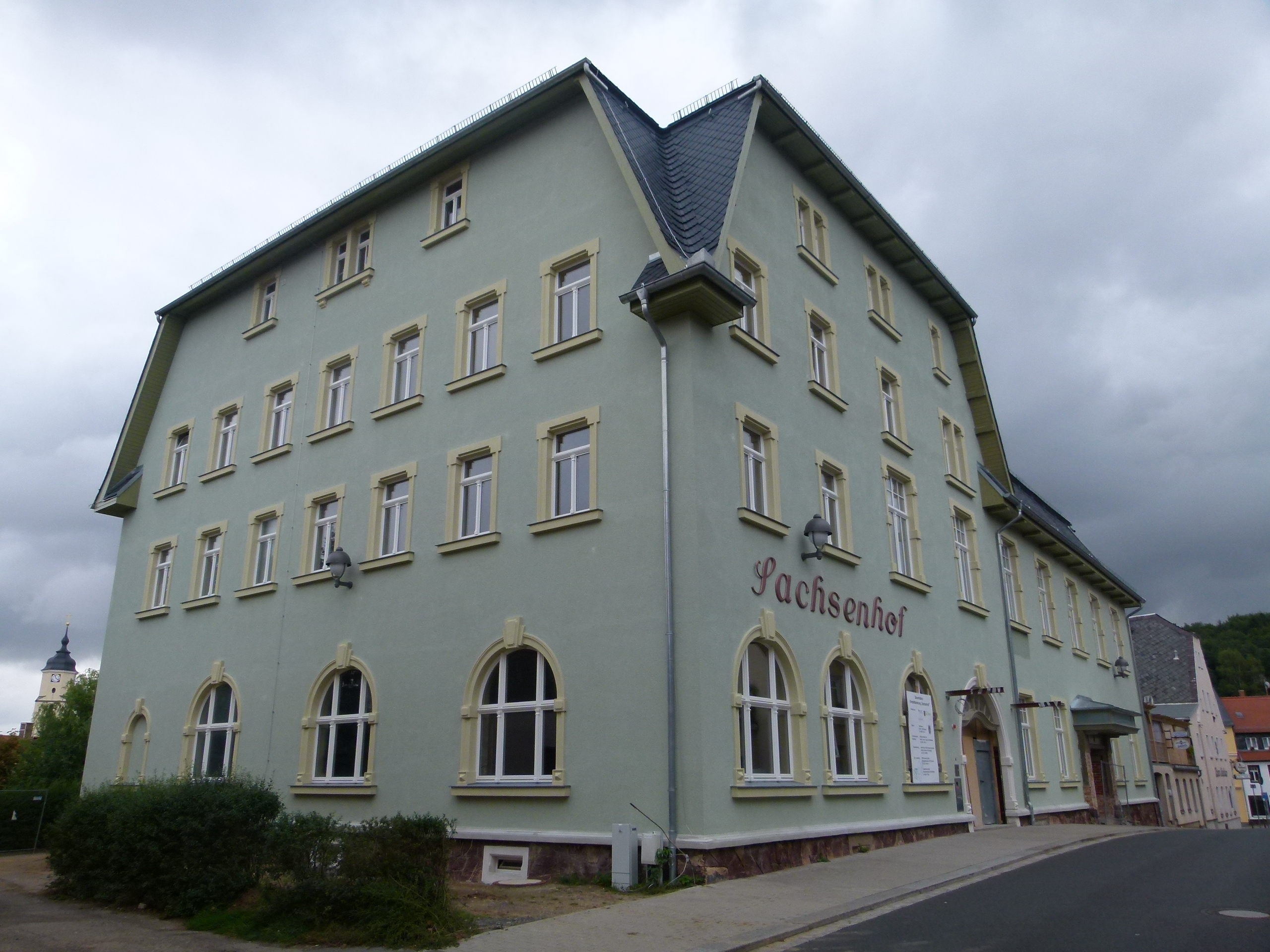 Denkmalgeschütztes Haus, Schulstrasse 2, Nossen, Sachsen